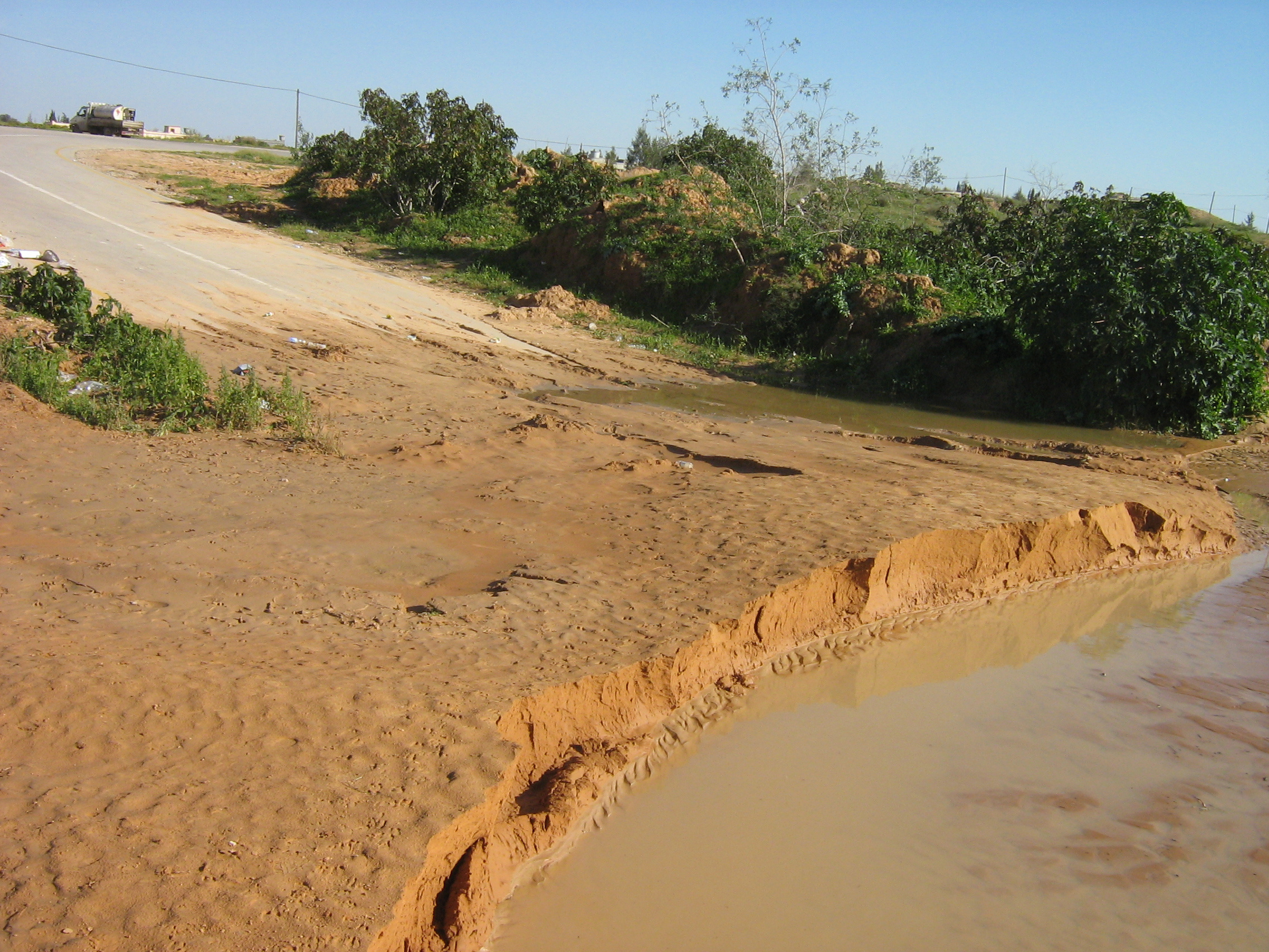 Дорога в сезон дождей в Бенгашире. Ливия.